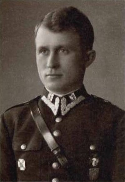 Oficer 37 pułku piechoty okresu kampanii wrześniowej Synoradzki Stanisław Na lewej kieszeni: odznaka oficerska 37pp, pod nią absolwencka Sz. Podchorążych Piechoty w Ostrowi - Komorowo; Na prawej kieszeni: Odznaka Komendancka Przysposobienia Wojskowego